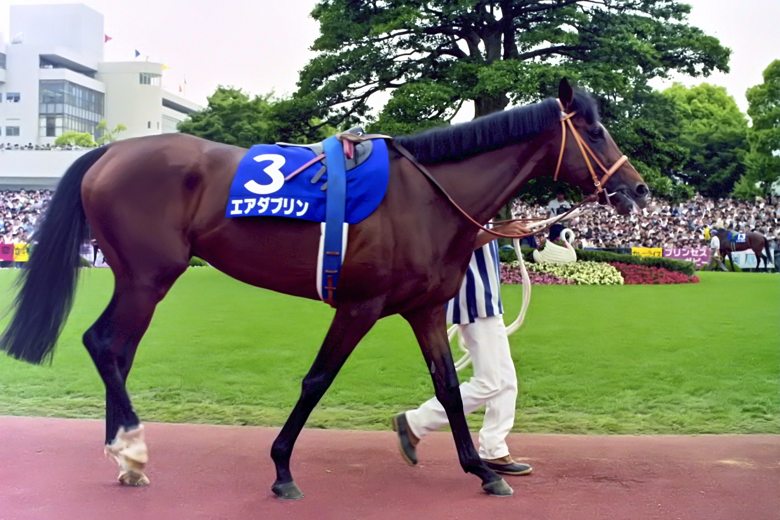 エアダブリン 1995年6月4日 京都競馬場